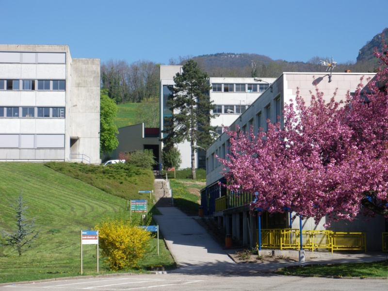 Lernejdomaro Victor Considerant ĉe Salins-les-Bains, Ĵuraso, Franĉ-Konteo, Francio.